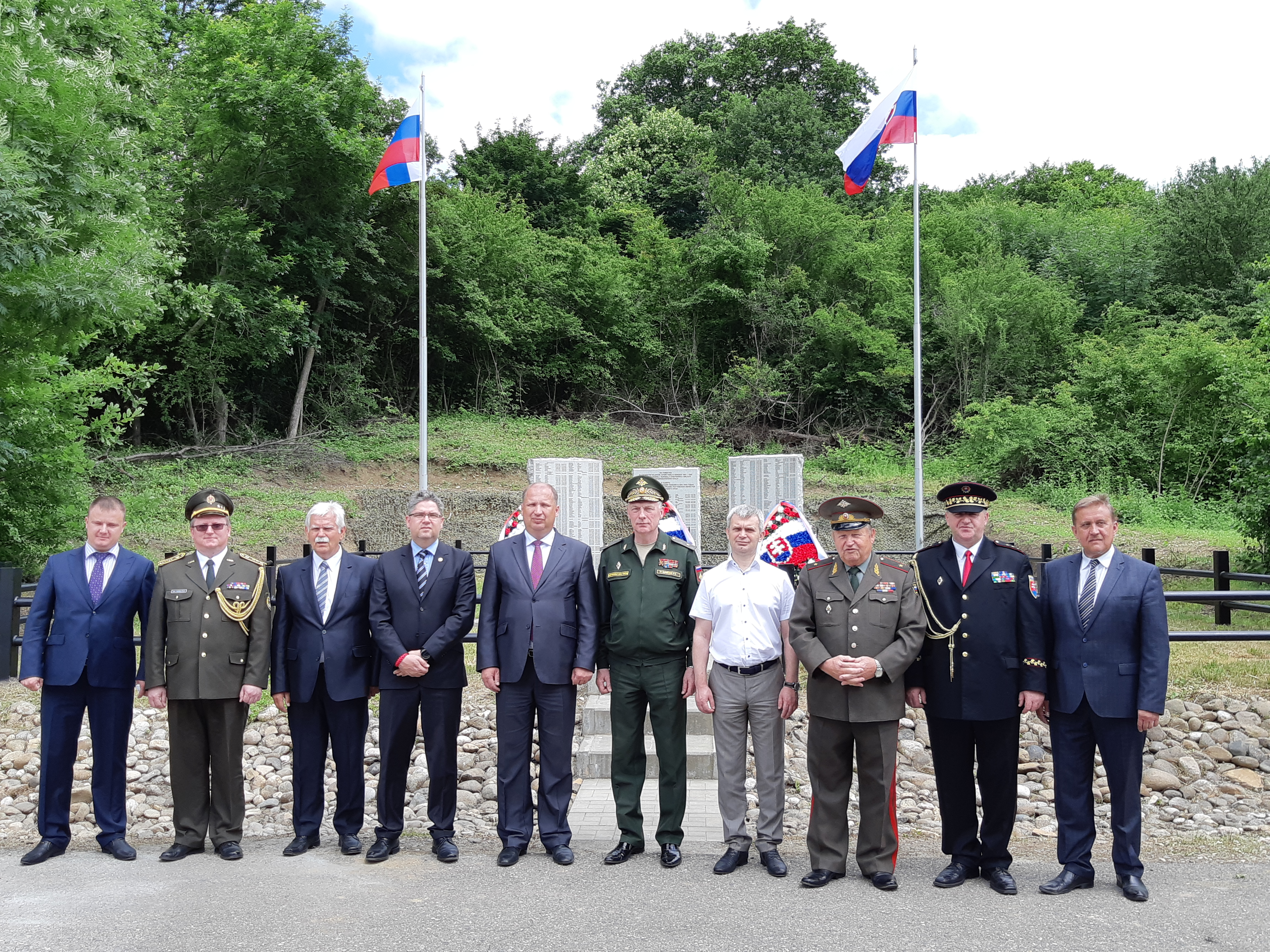 У памятника павшим словацким военнослужащим в Краснодарском крае. 2018